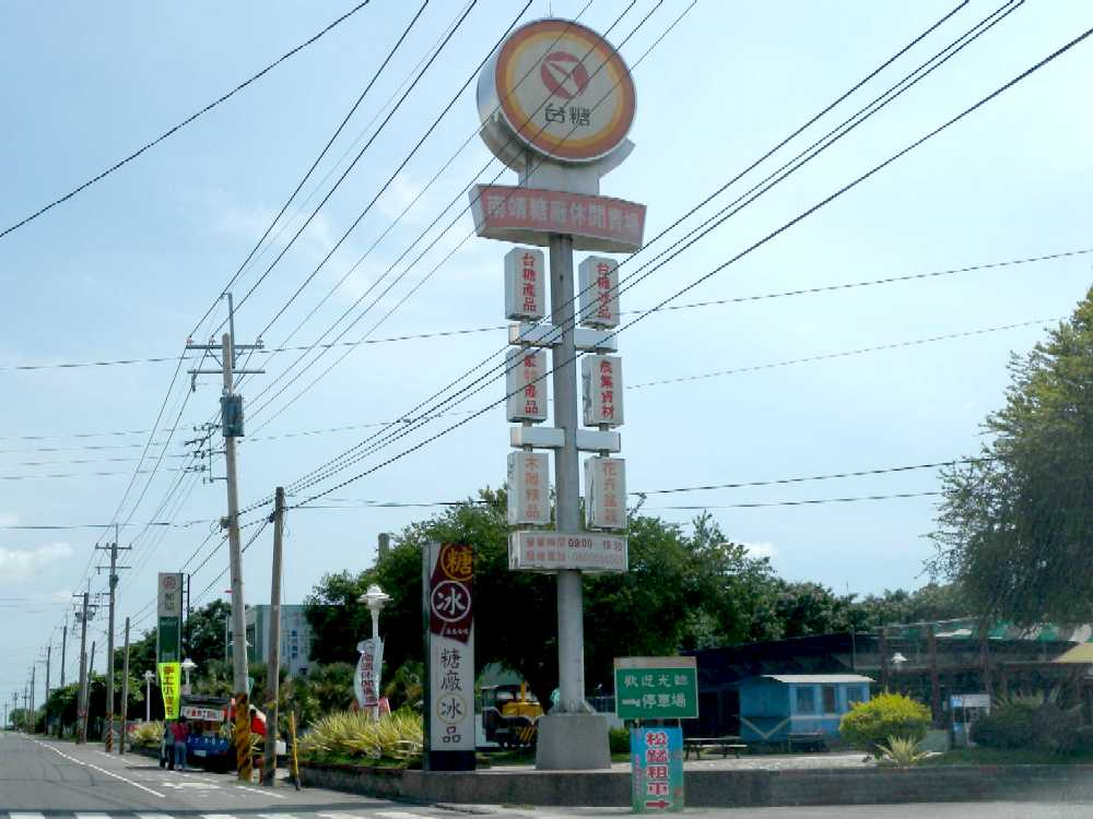 中文（台灣）: 嘉義南靖糖廠休閒廣場。